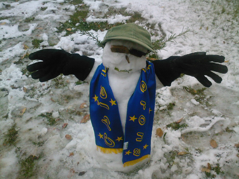 Classico pupazzo di neve di piccole dimensioni